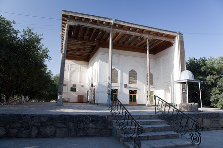 Бухара. Мечеть Балянд